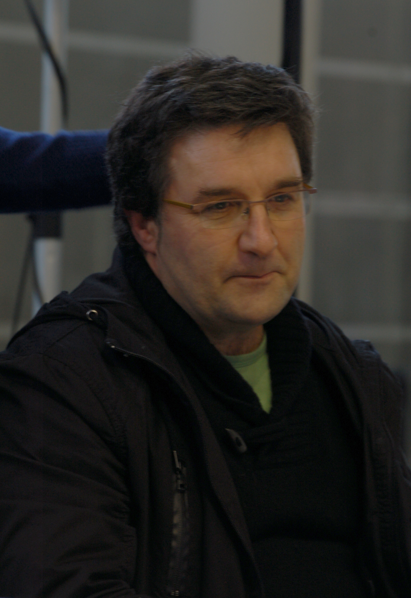 Paco Macías no CulturGal 2010